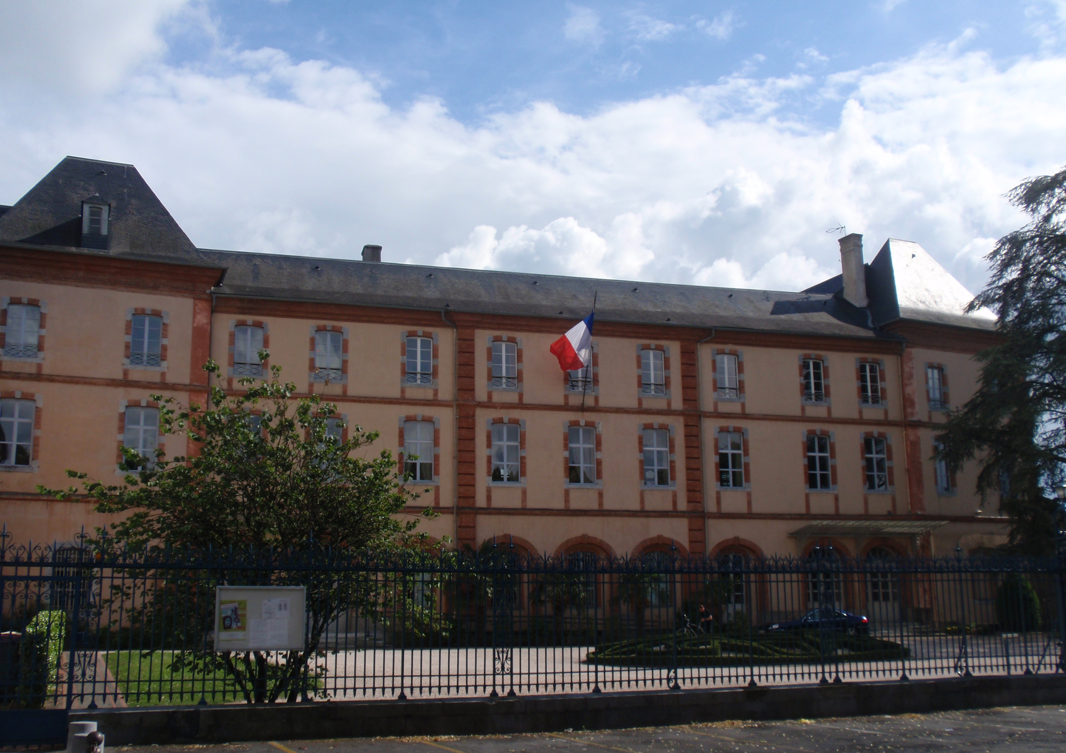 Ancien Evêché de Bigorre, Préfecture des Hautes-Pyrénées